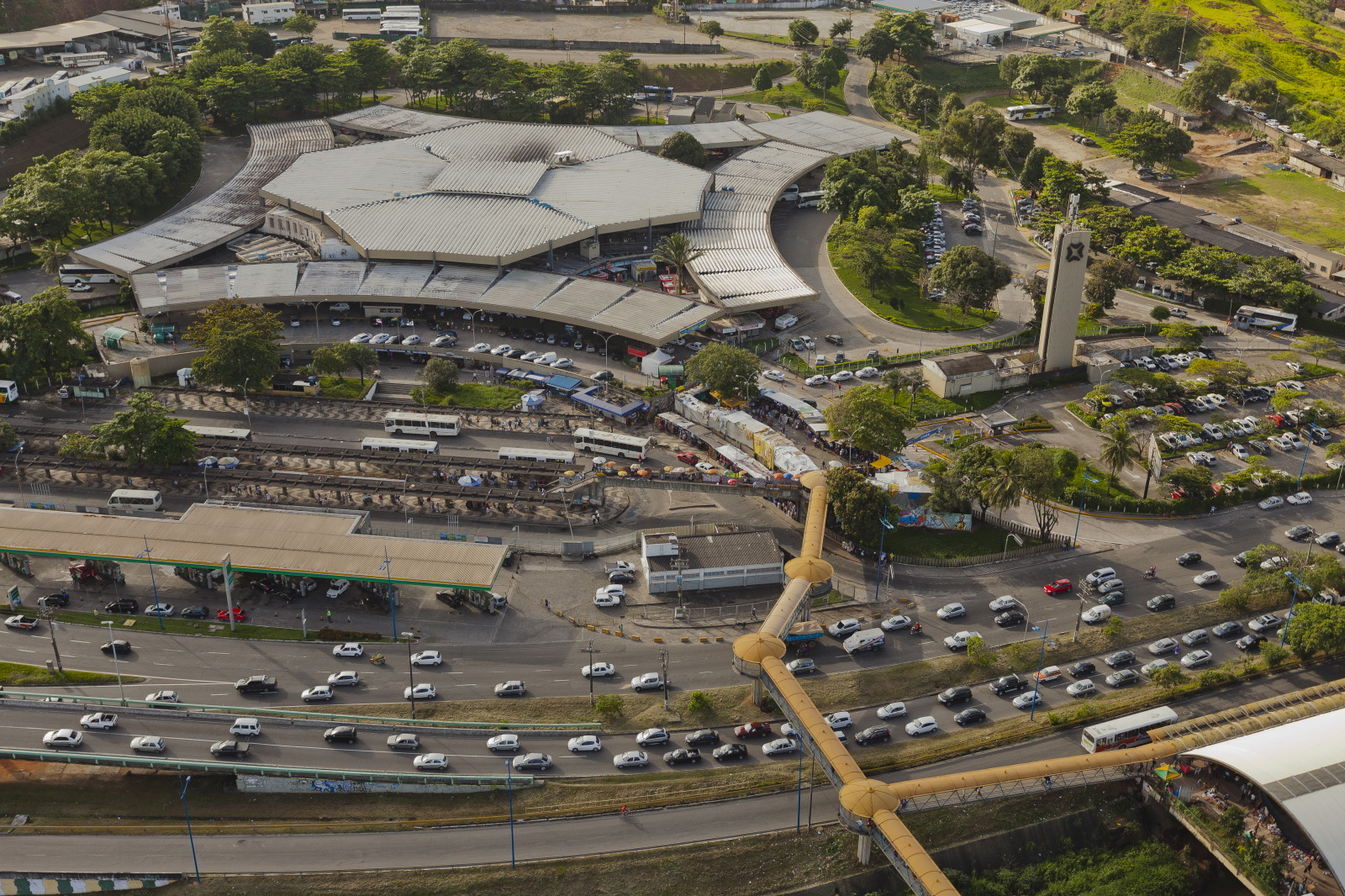 Vista aérea da região da Estação Rodoviária e do Terminal Rodoviário de Salvador, em Salvador.